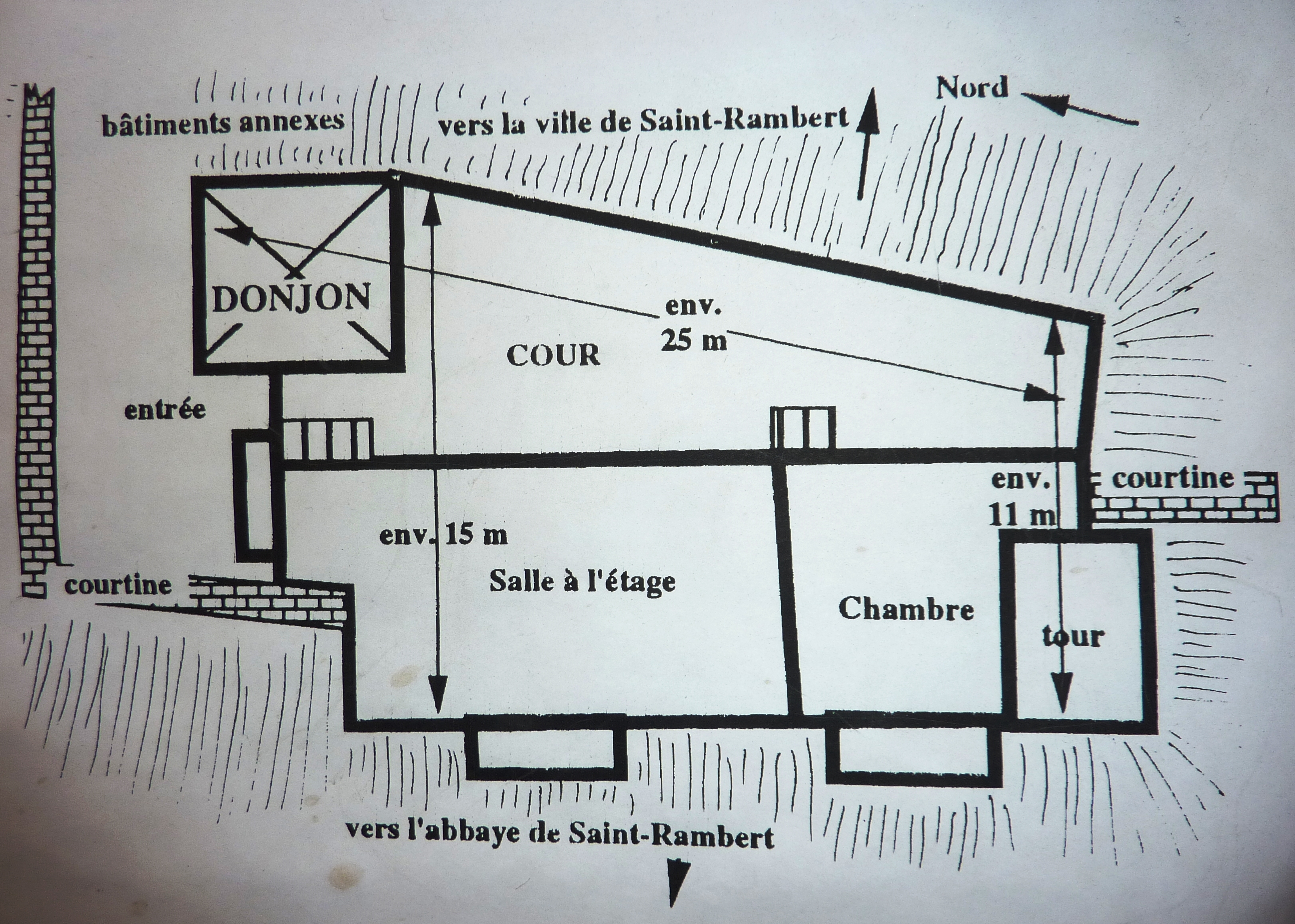 Plan (supposé) du château de Cornillon à Saint-Rambert-en-Bugey.